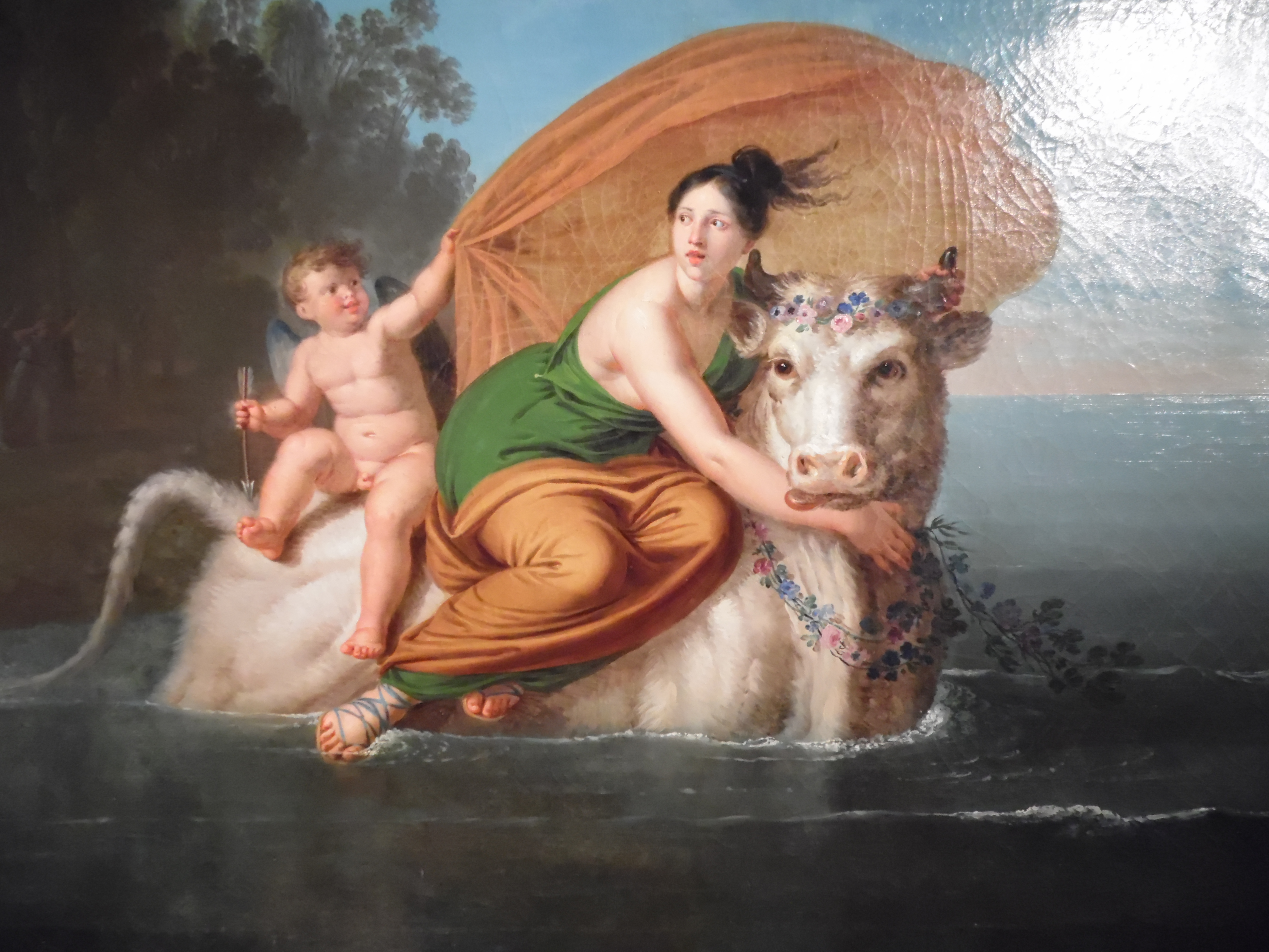 Giuseppe Patania (18.01.1780 - 23.02.1852): Ratto d‘ Europa (1828-1829)